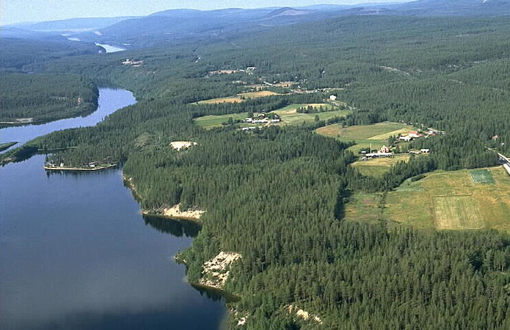 Motiv: Nedre Kuouka Nyckelord: Flygbilder Kategori: Fjällbygd Nedre Kuouka